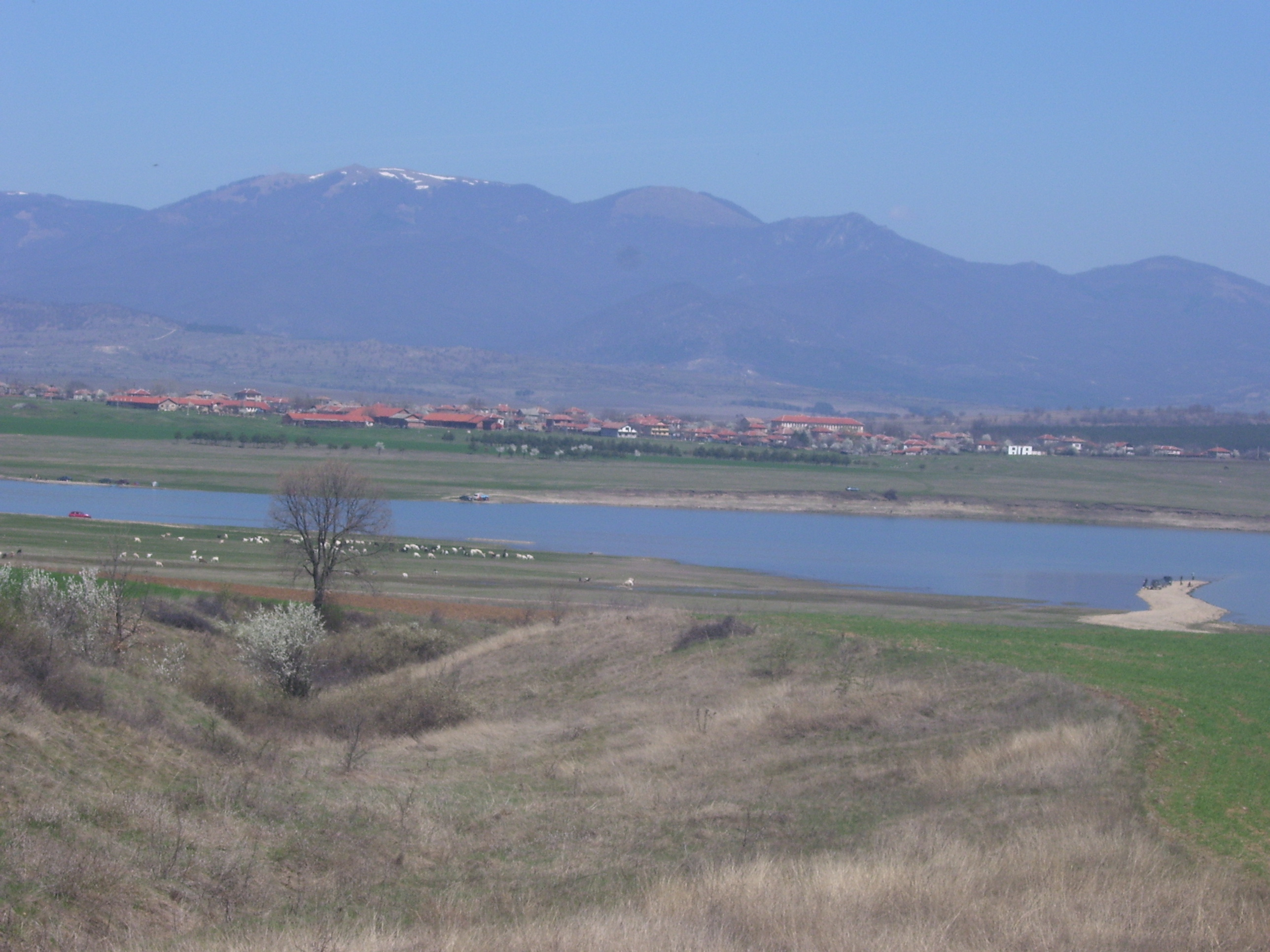 Язовир Пясъчник и село Беловица.